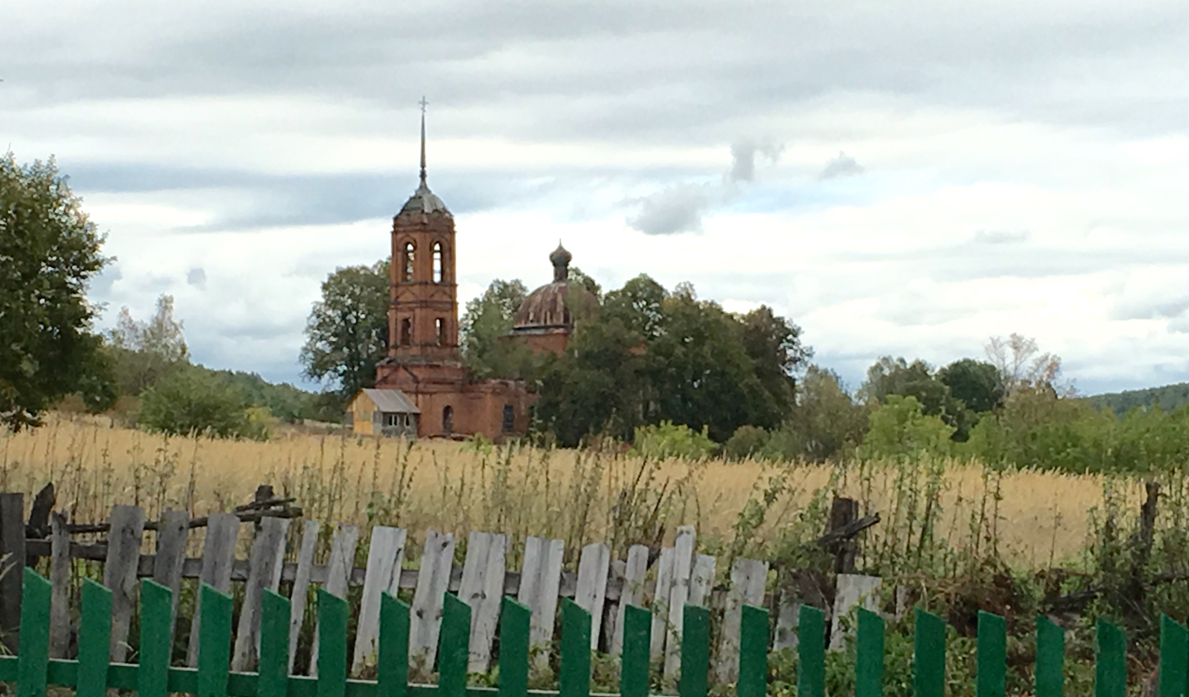 Вид на Никольский храм с. Казарка Никольского района Пензенской области с юго-запада